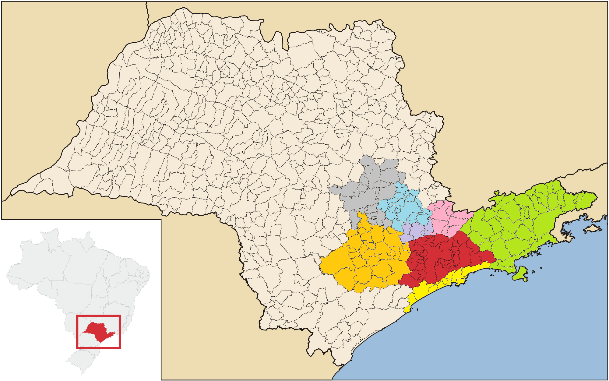 Macrometrópole de acordo com o Emplasa e Subsecretaria de Desenvolvimento Metropolitano